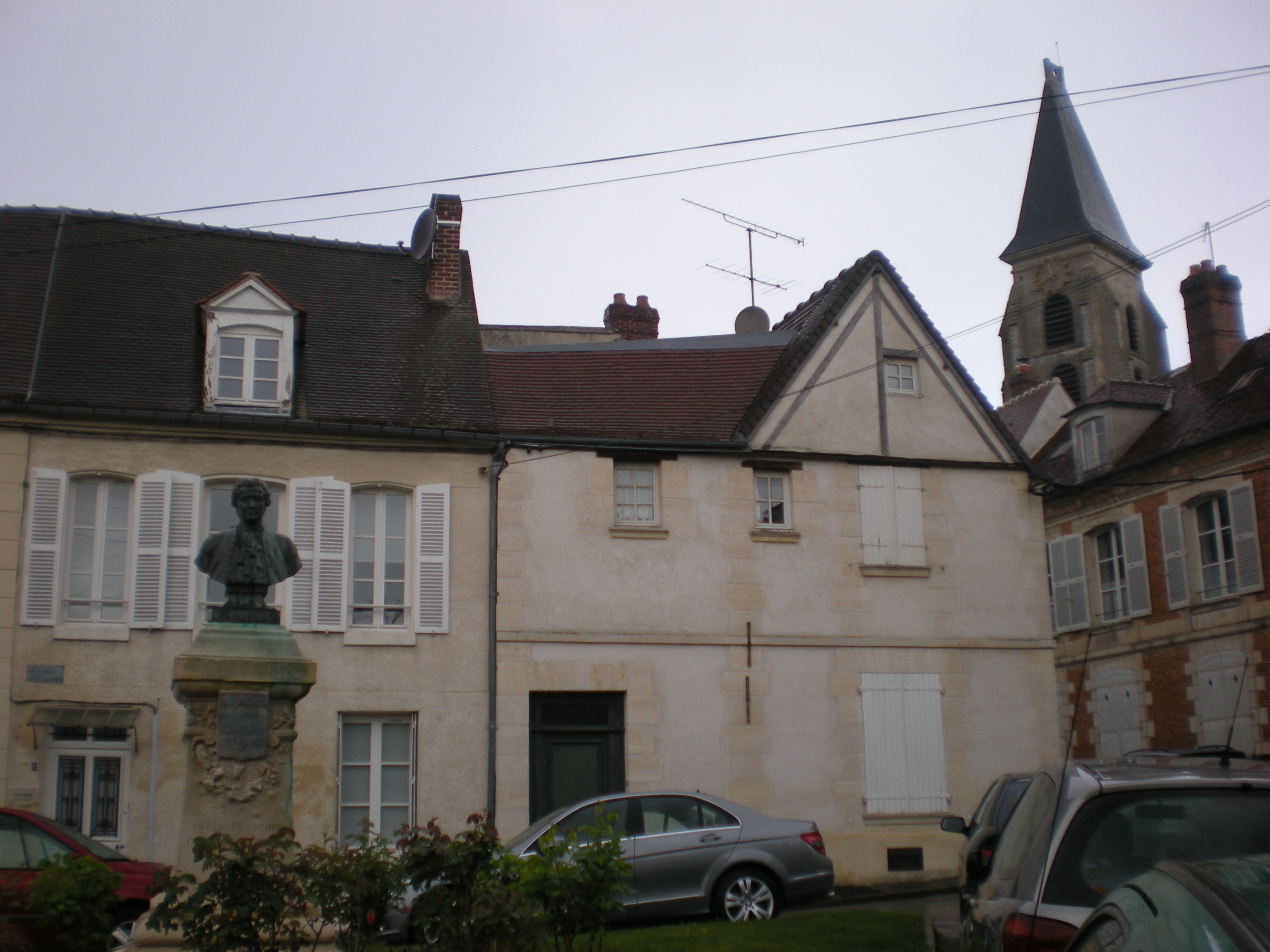 La place Henri Dunant (buste de qui ? sur le socle "César François ..." ?) César-François Cassini de Thury ?